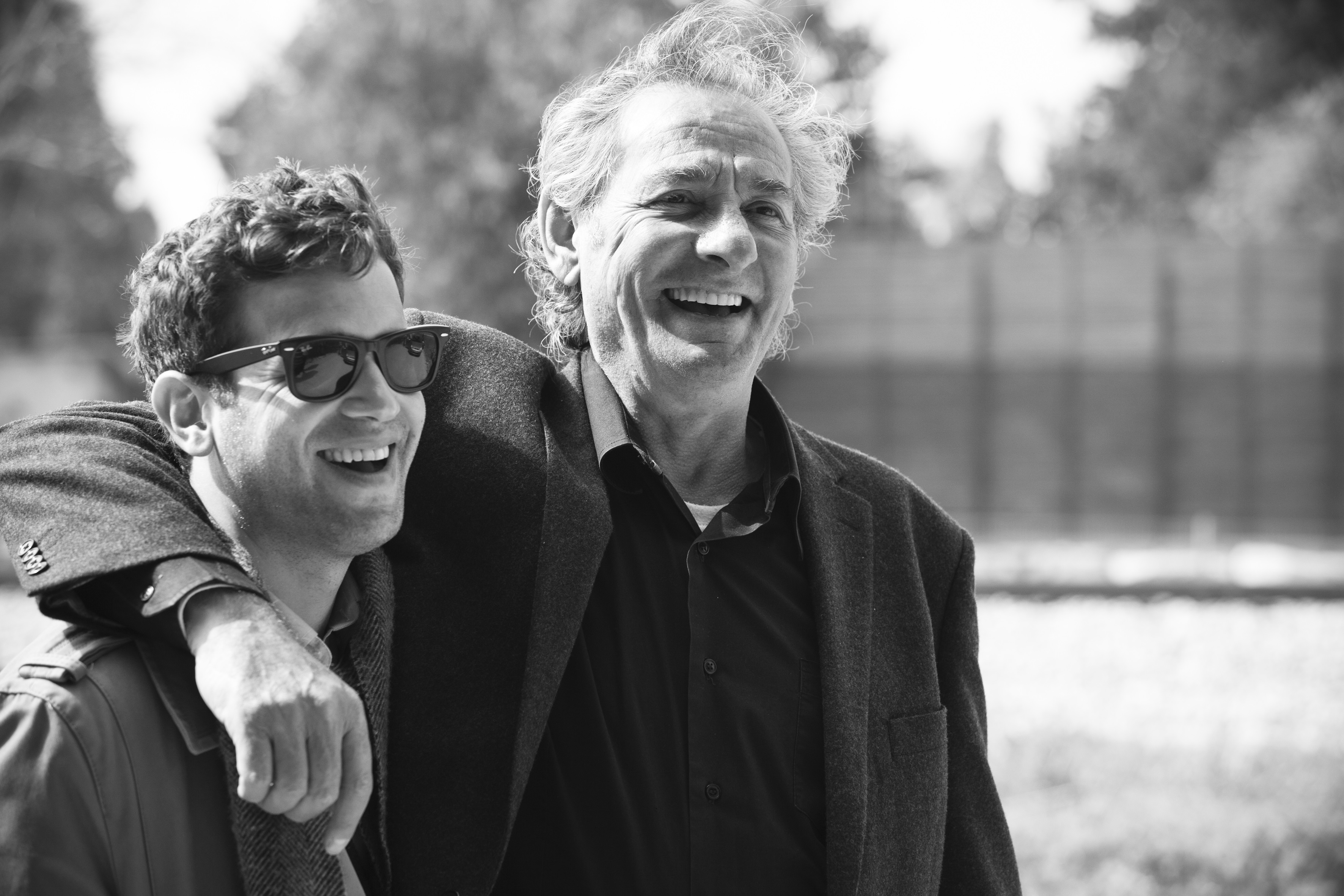 מיכאל שרפשטיין